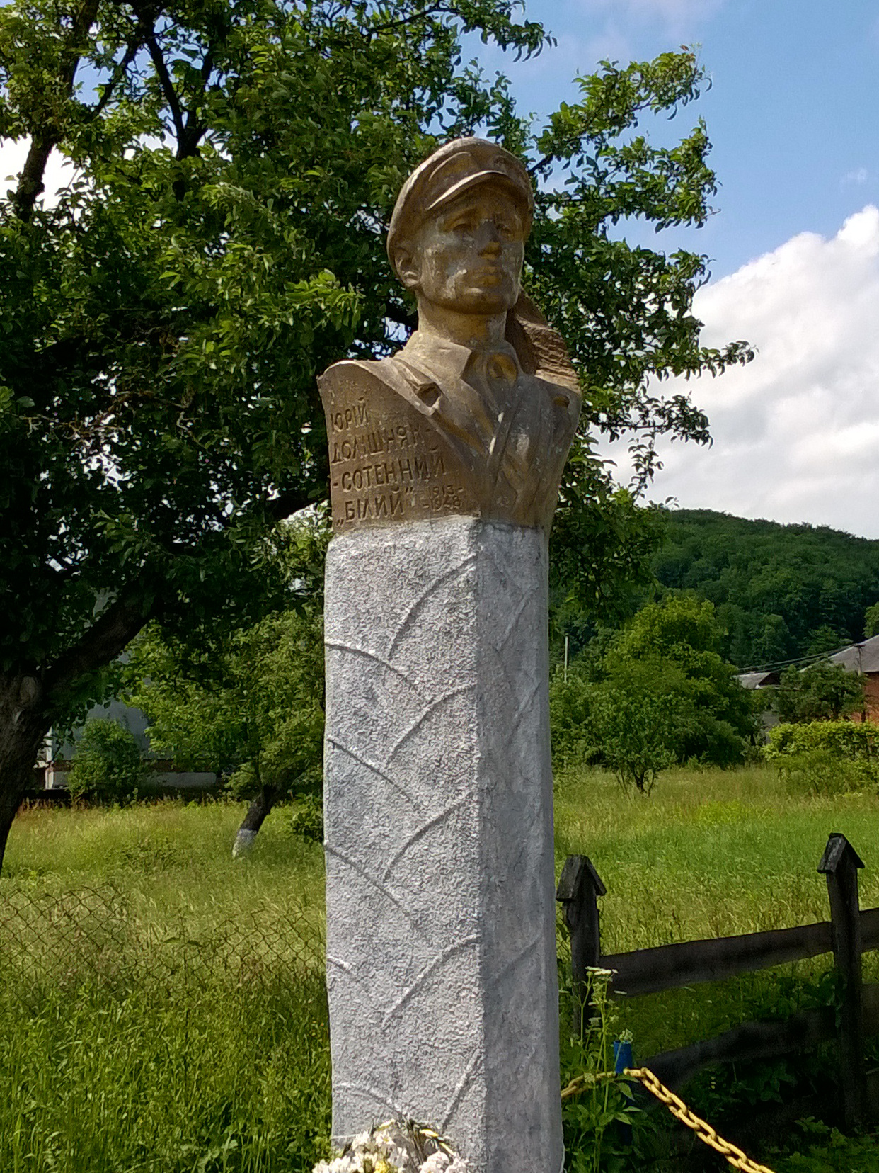 Пам'ятник сотенному Білому (Юрієві Долішняку) у с-щі Яблунові